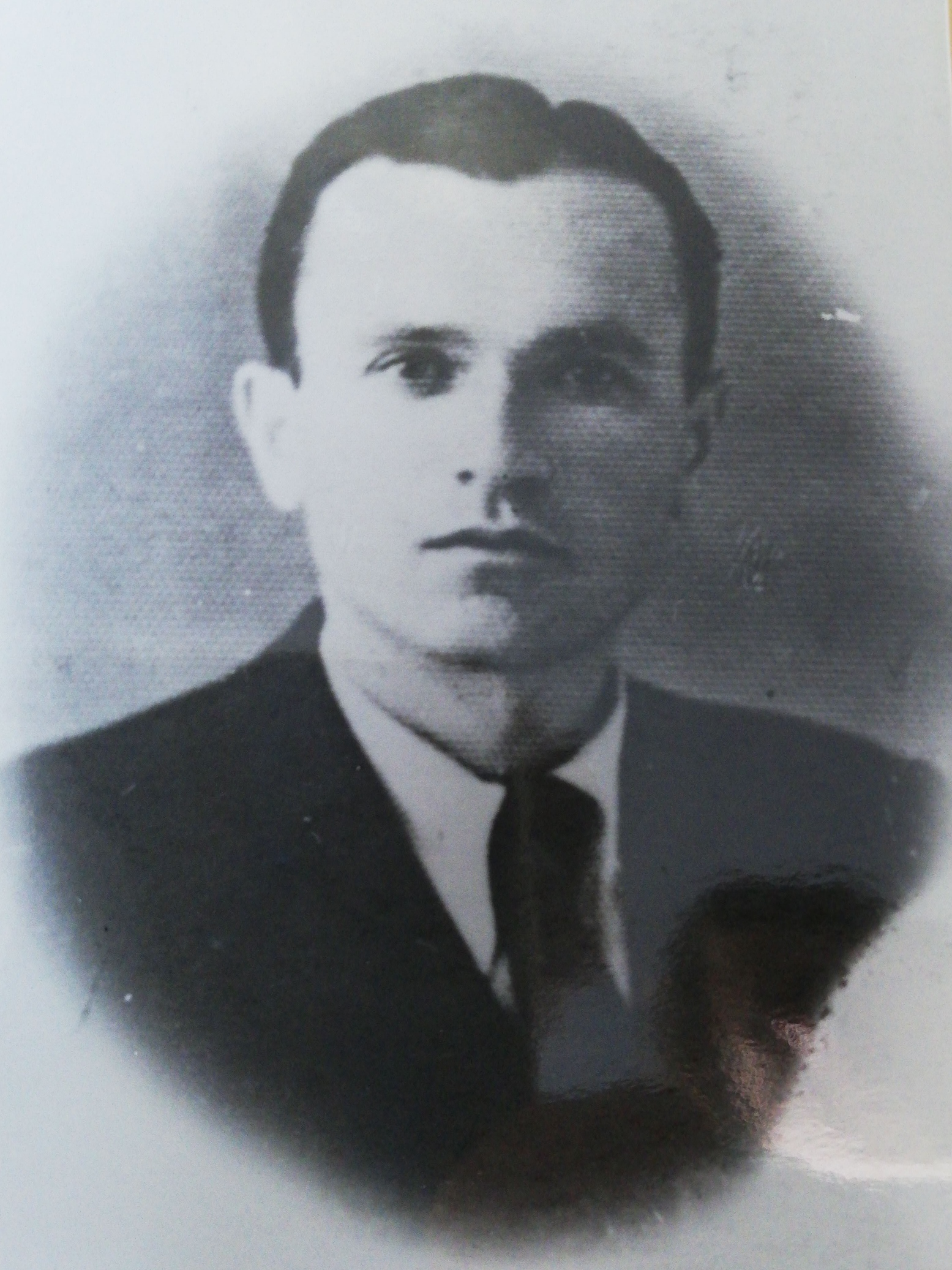 Demos Malavasi martire antifascista nato a Novi di Modena, testimone del suo tempo nella lotta per la democrazia e l'eguaglianza sociale, con oltre 8 anni di carcere e confino, trucidato a 30 anni dai nazifascisti l'8 settembre 1943 a Maranello.